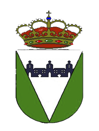 Escudo de Villanueva Del Campo